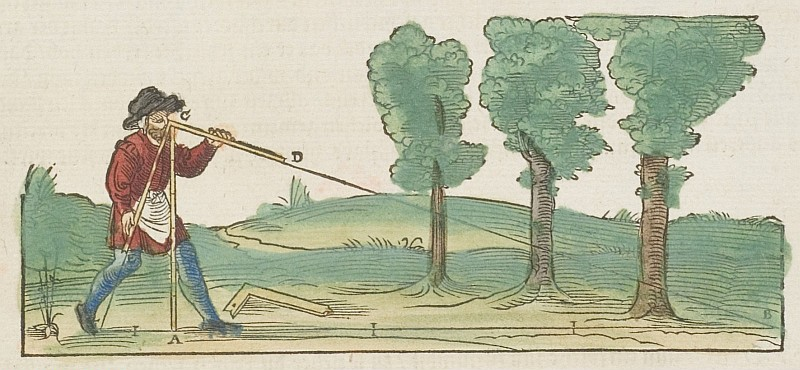 Original image description from the Deutsche Fotothek Architektur & Geometrie & Vermessung